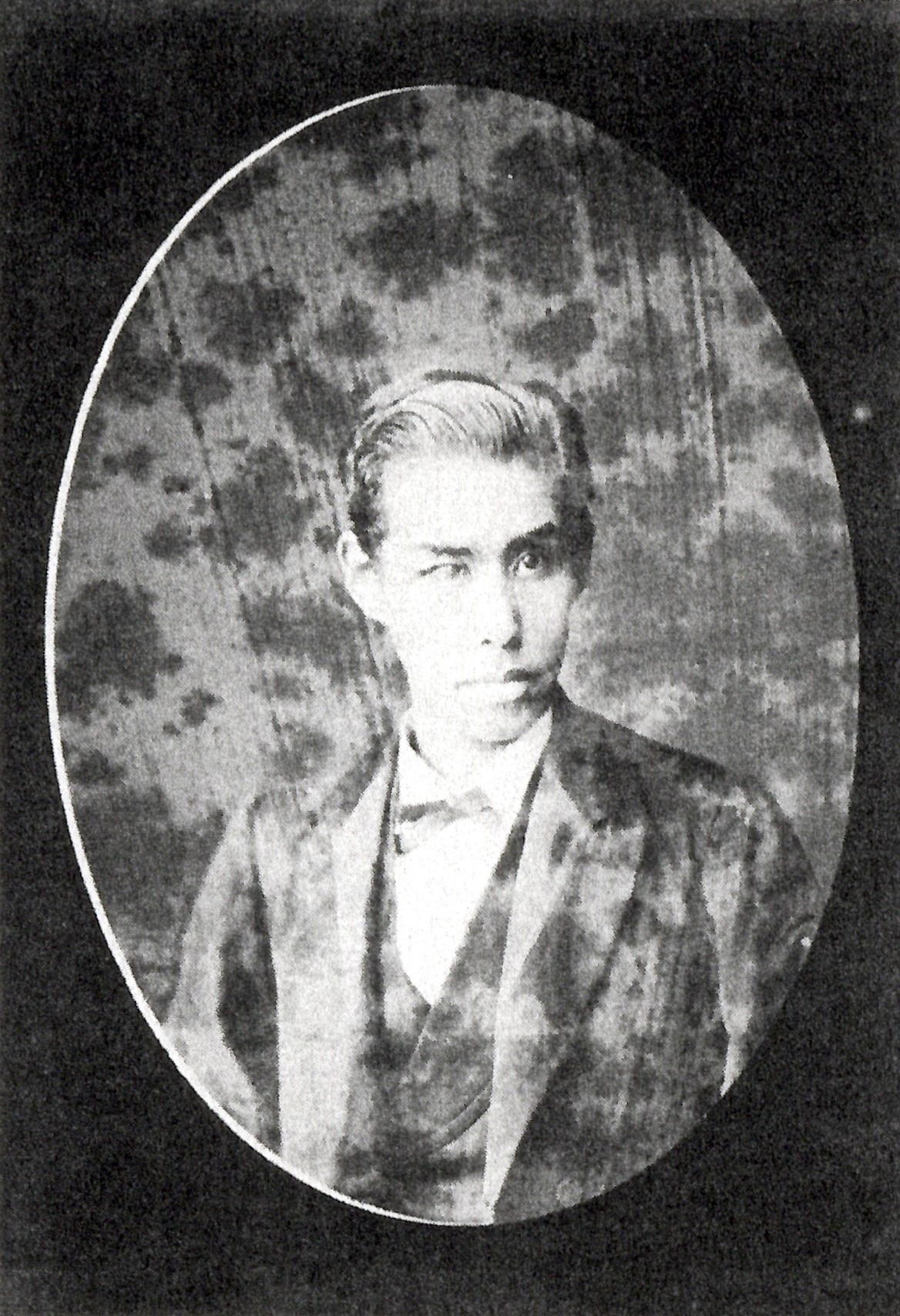 安部信発の肖像写真。